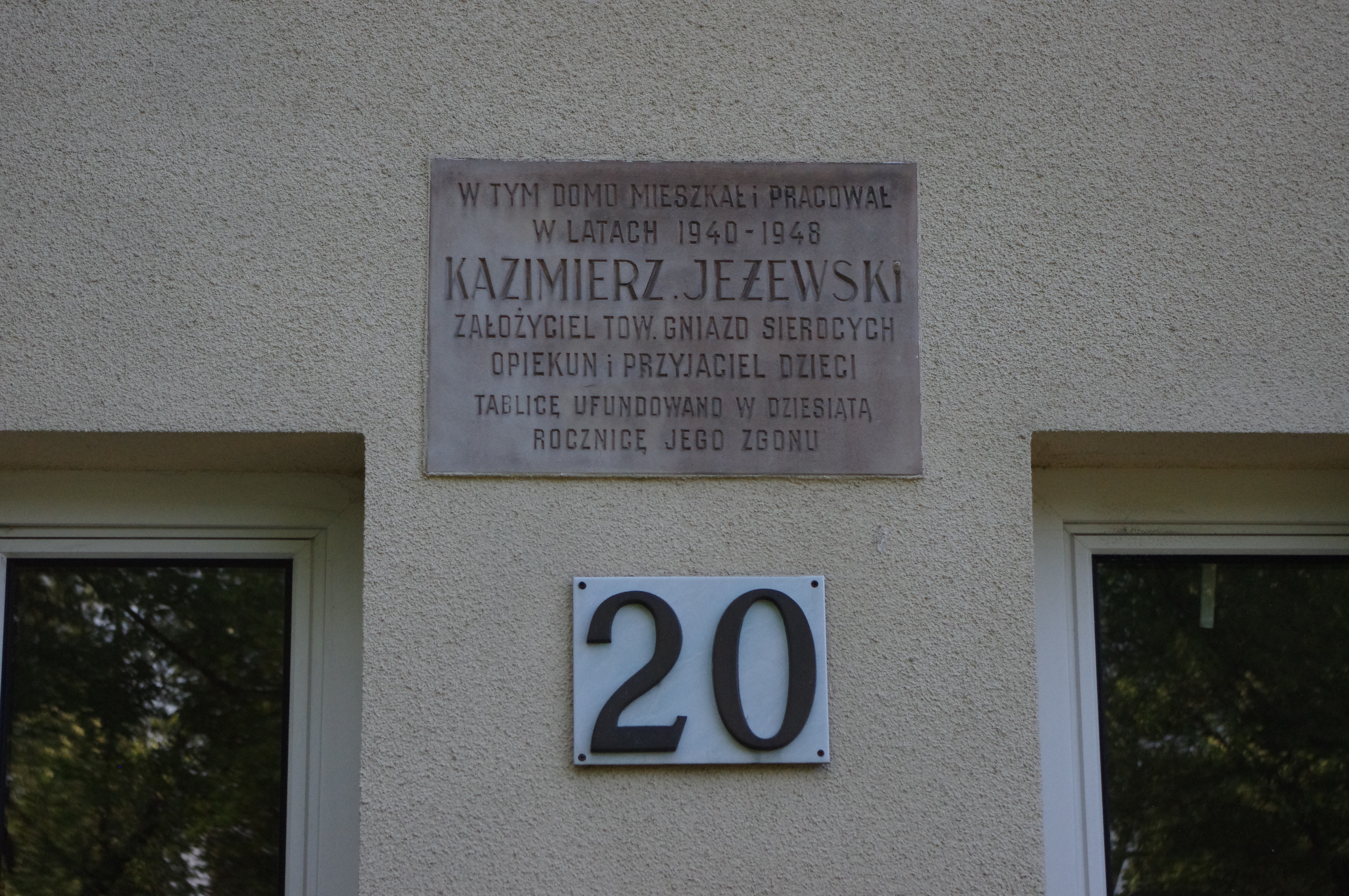 Tablica upamiętniająca pedagoga Kazimierza Jeżewskiego na domu przy al. Wojska Polskiego 20 na Starym Żoliborzu w Warszawie